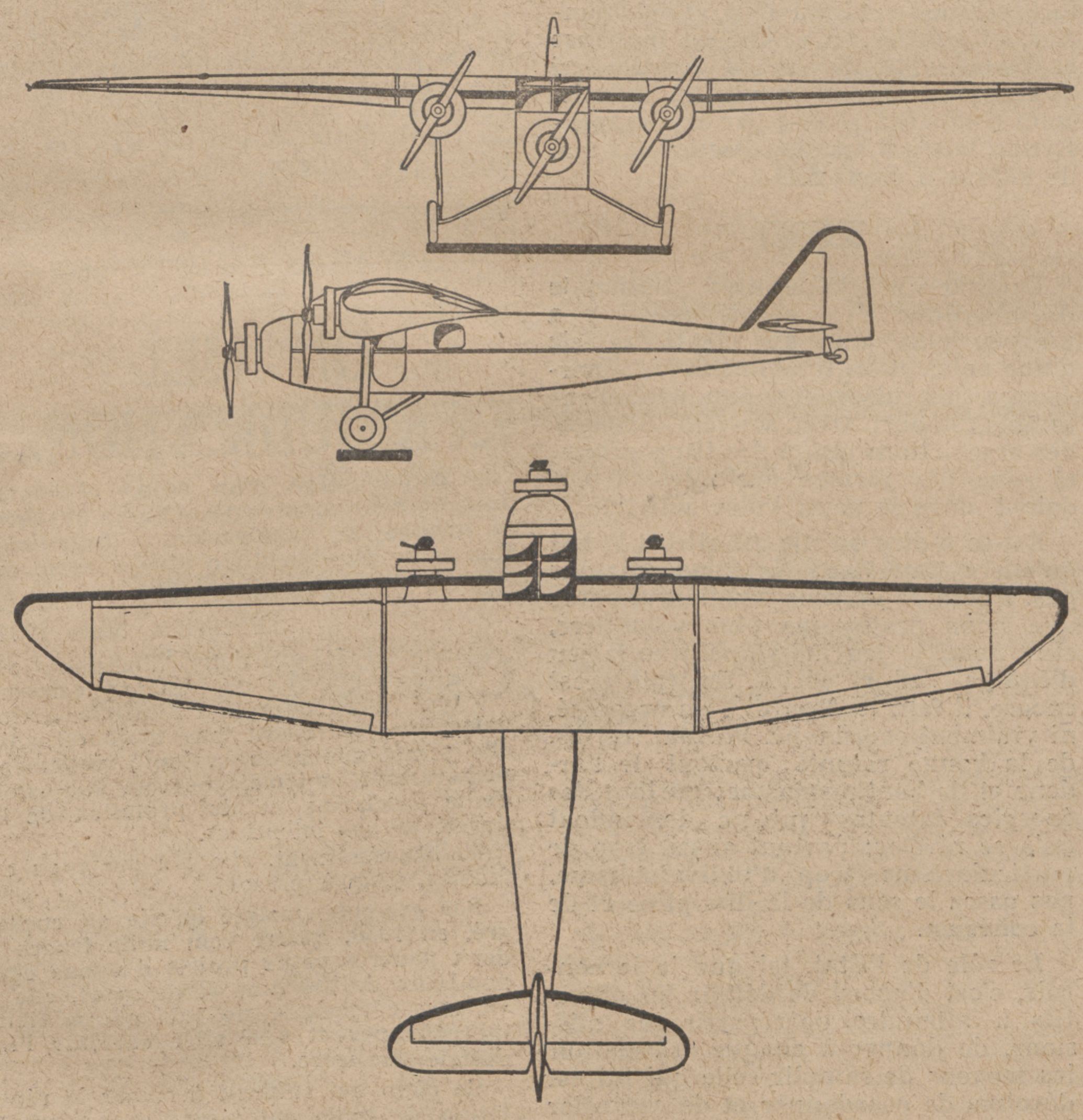 Plan 3 vues du Bloch MB.61